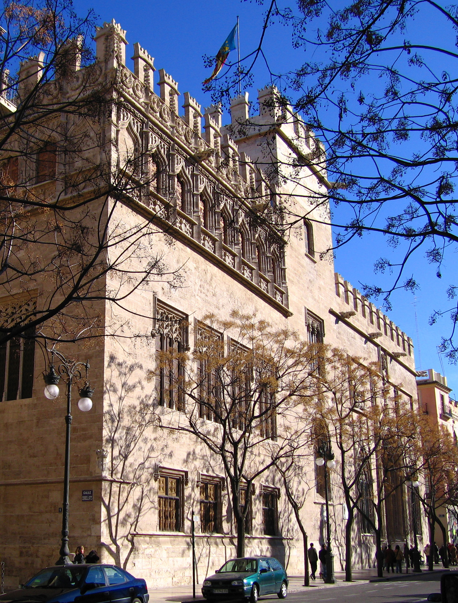 Llotja de la Seda (València)